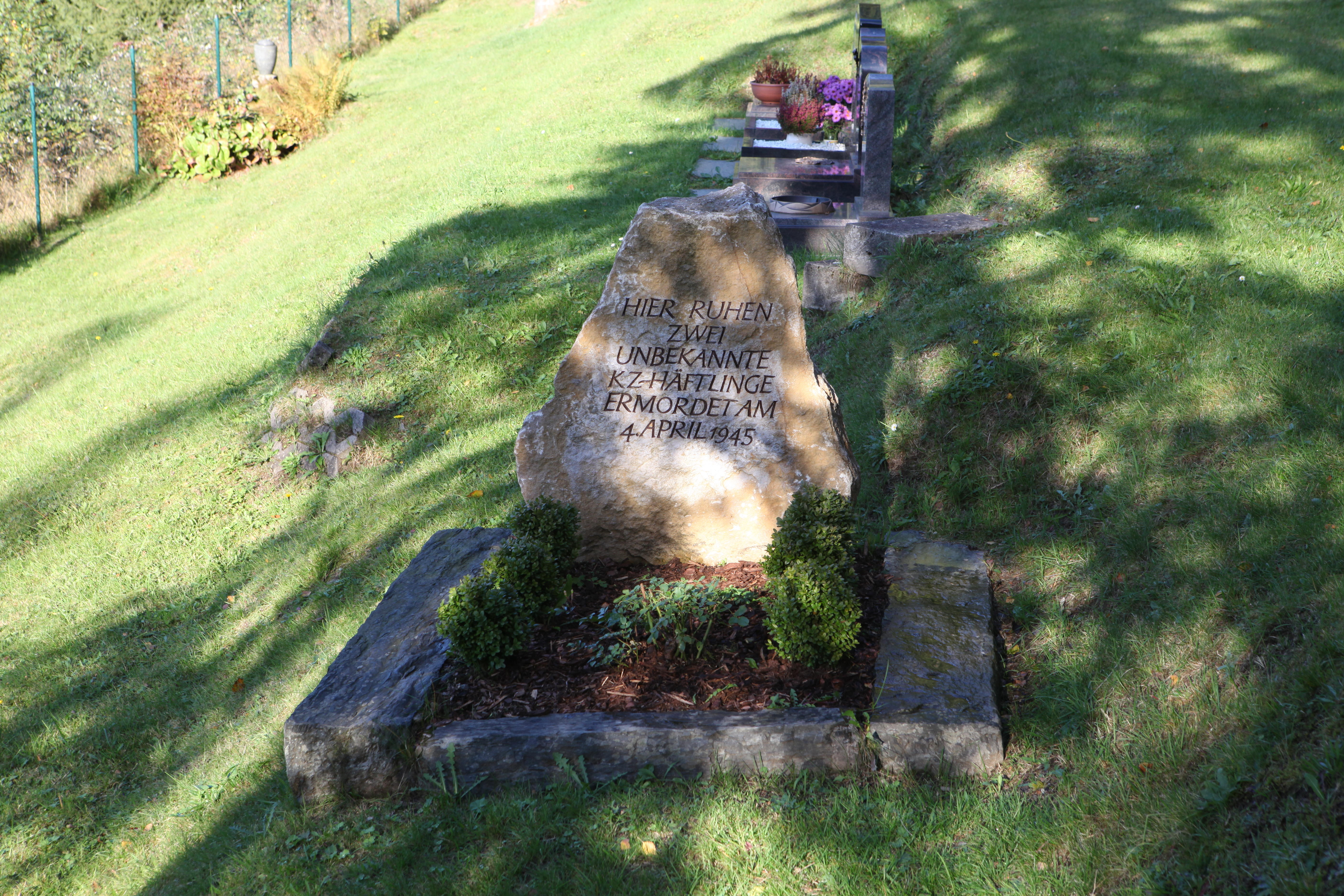 Grabstätte in Eschenthal, OT von Oberland am Rennsteig, Landkreis Sonneberg